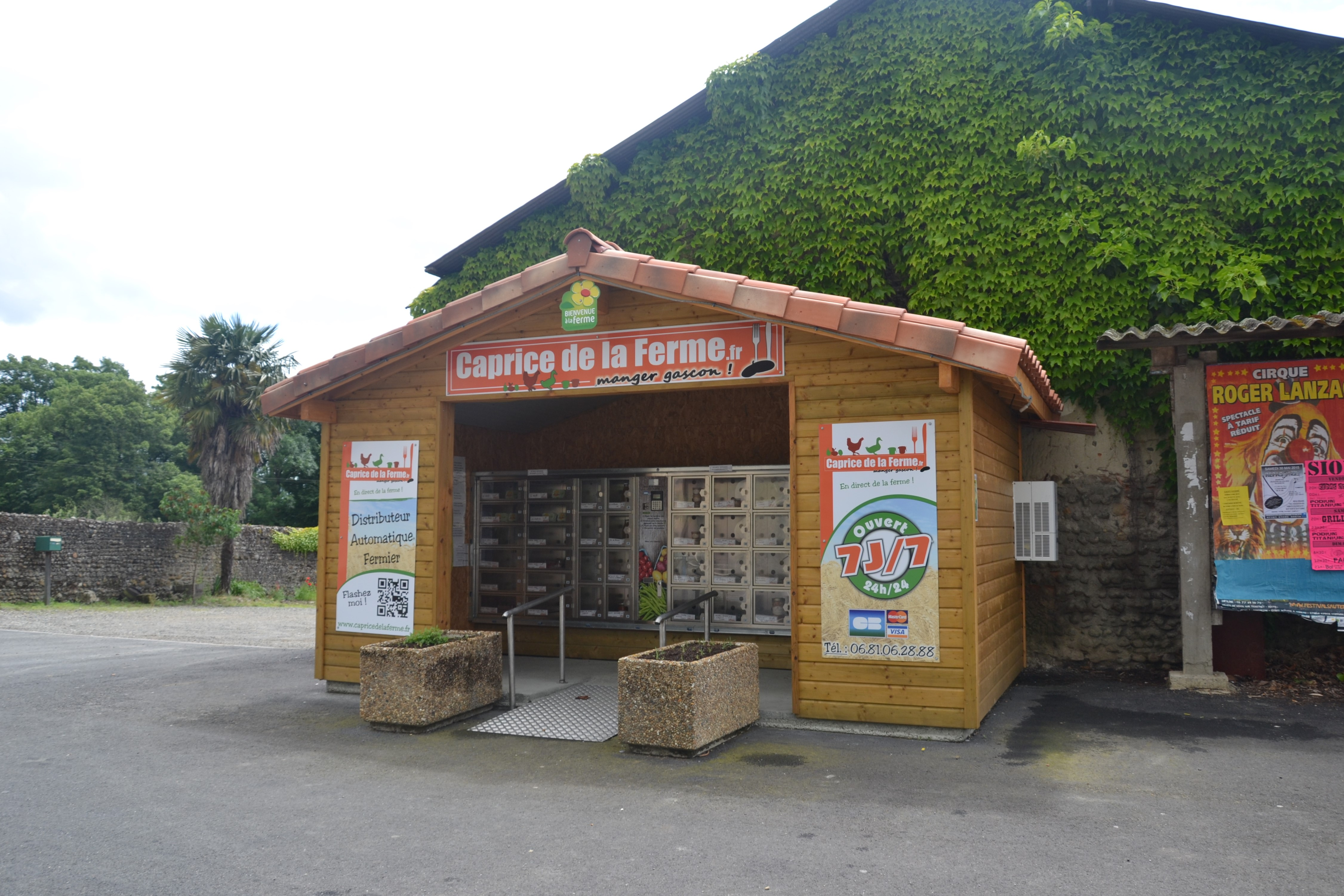 Vente libre de produits fermiers à Saint-Germé